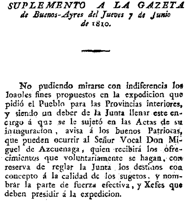 Resolución para la creación de una suscripción en apoyo de la formación del ejército auxiliar al interior